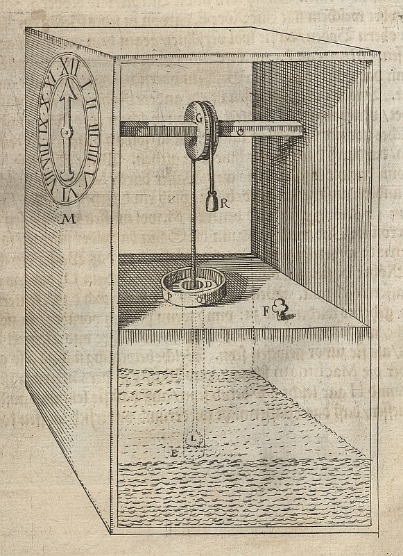 Original image description from the Deutsche Fotothek Physik & Mechanik & Uhr & Wasserdruck